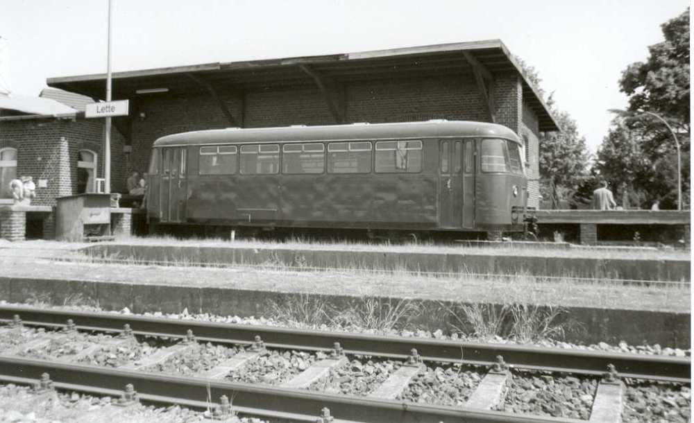 Die Güterabfertigung des Bahnhofes Lette mit dem musealen Teil eines Schienenbusses, eigenes Bild, copyright: GNU FDL